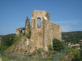 Ruines de l'église Saint Pons du XIIè siècle.